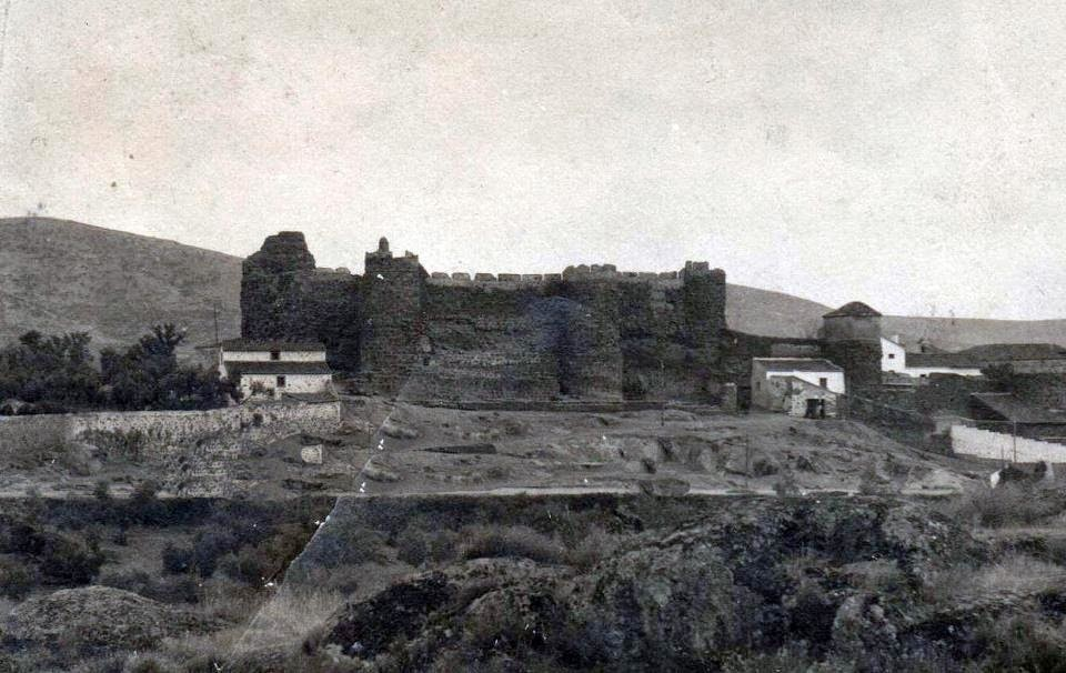 Alkázar de Plasencia antes de 1941